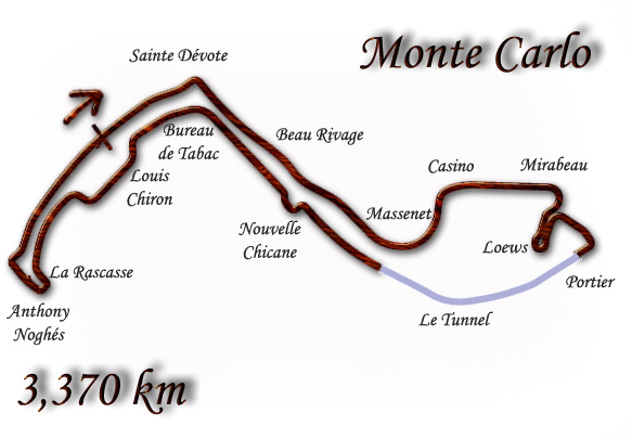 Plánek trati Grand Prix Monaka (Zařazený do mistrovství světa Formule 1 v roce 2000-2002).